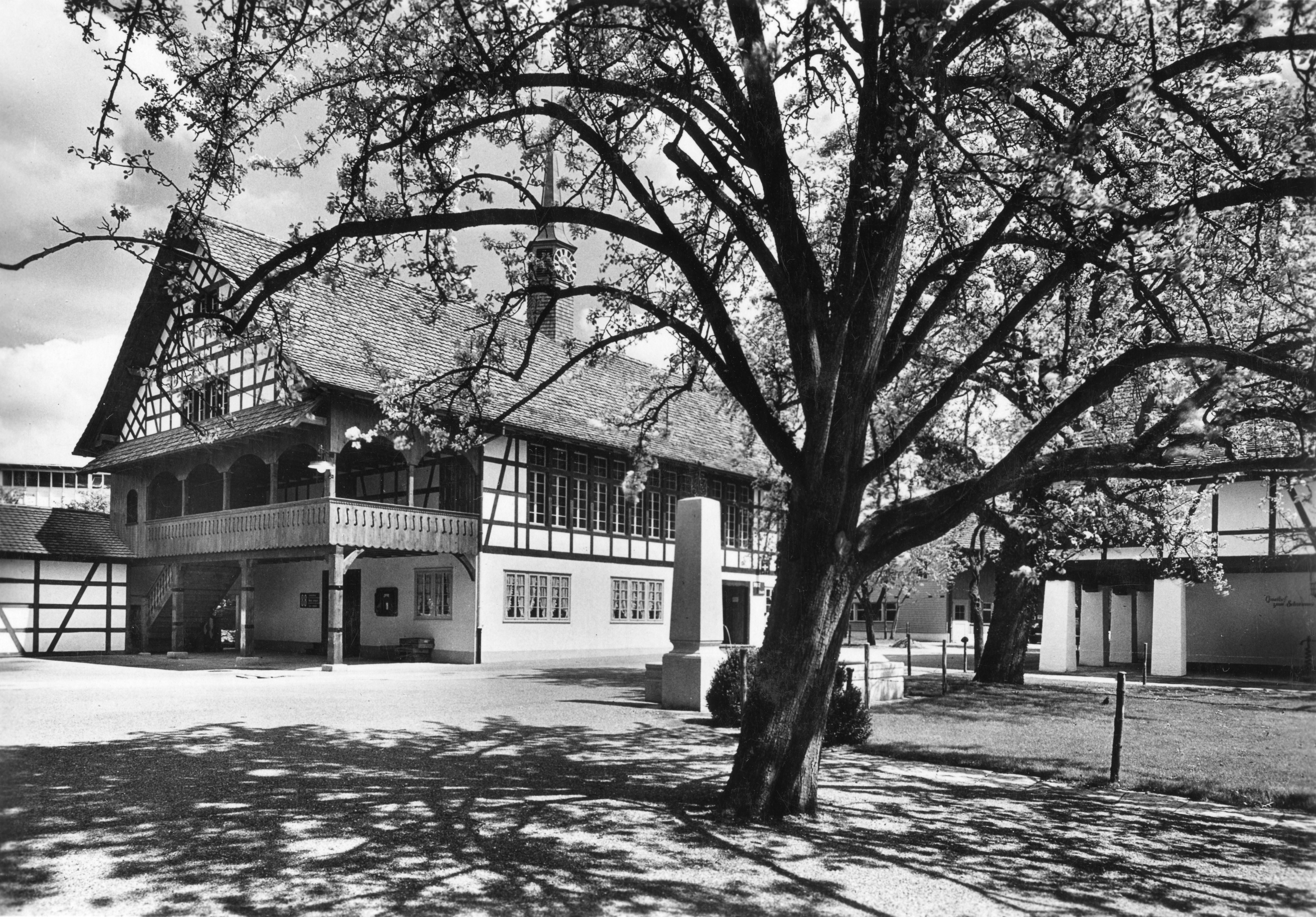 Landesausstellung 1939 in Zürich, Schweiz: Zürichhorn, Gemeindehaus im Landi-Dörfli südwestlich der Fröhlichstrasse